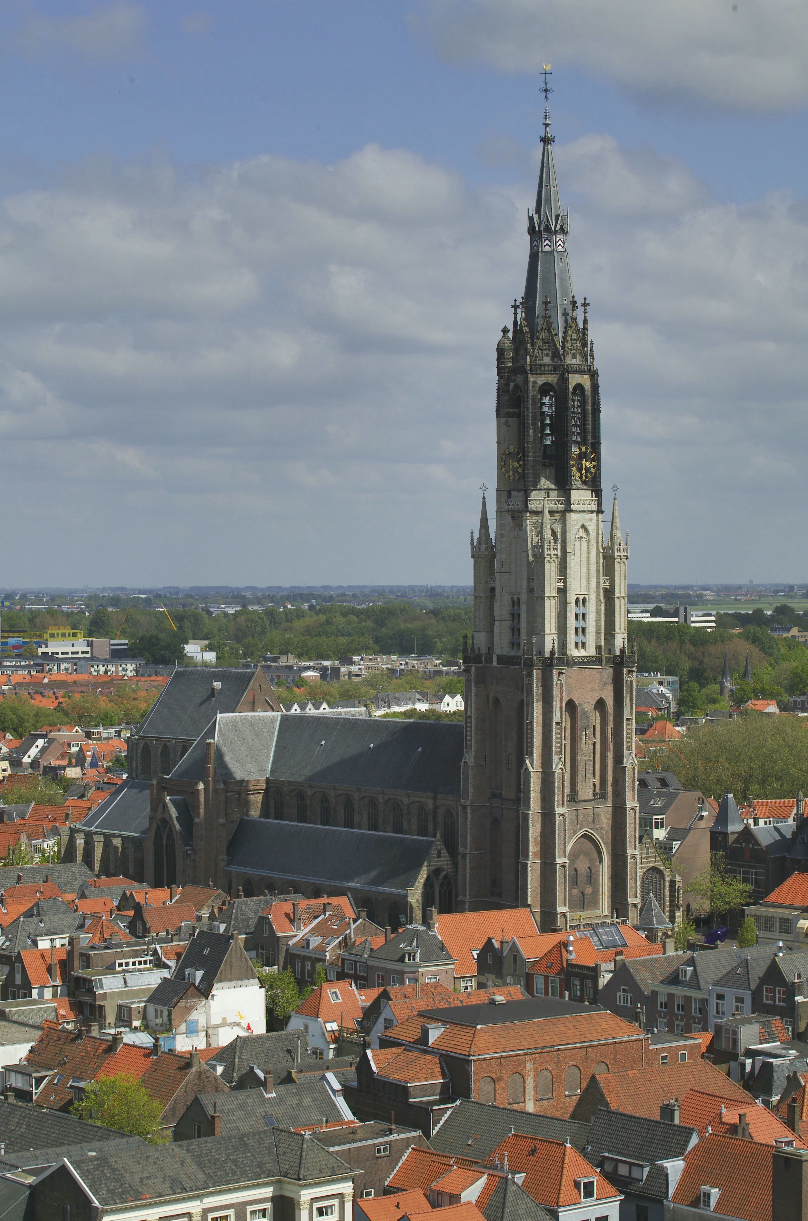 Overzicht Nieuwe Kerk gezien vanaf de toren van de Oude Kerk.